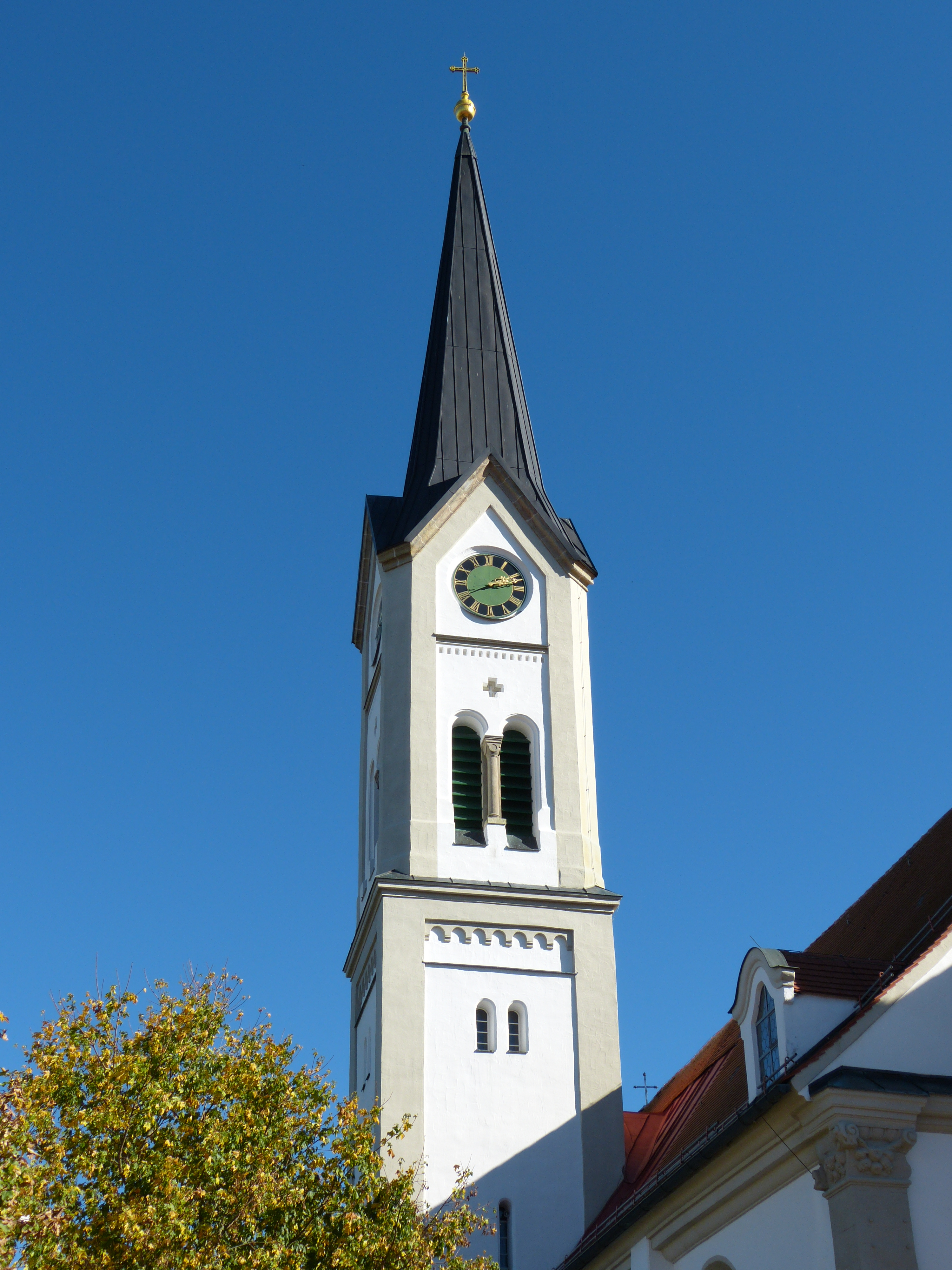 Mariä Himmelfahrt (Frauenzell)